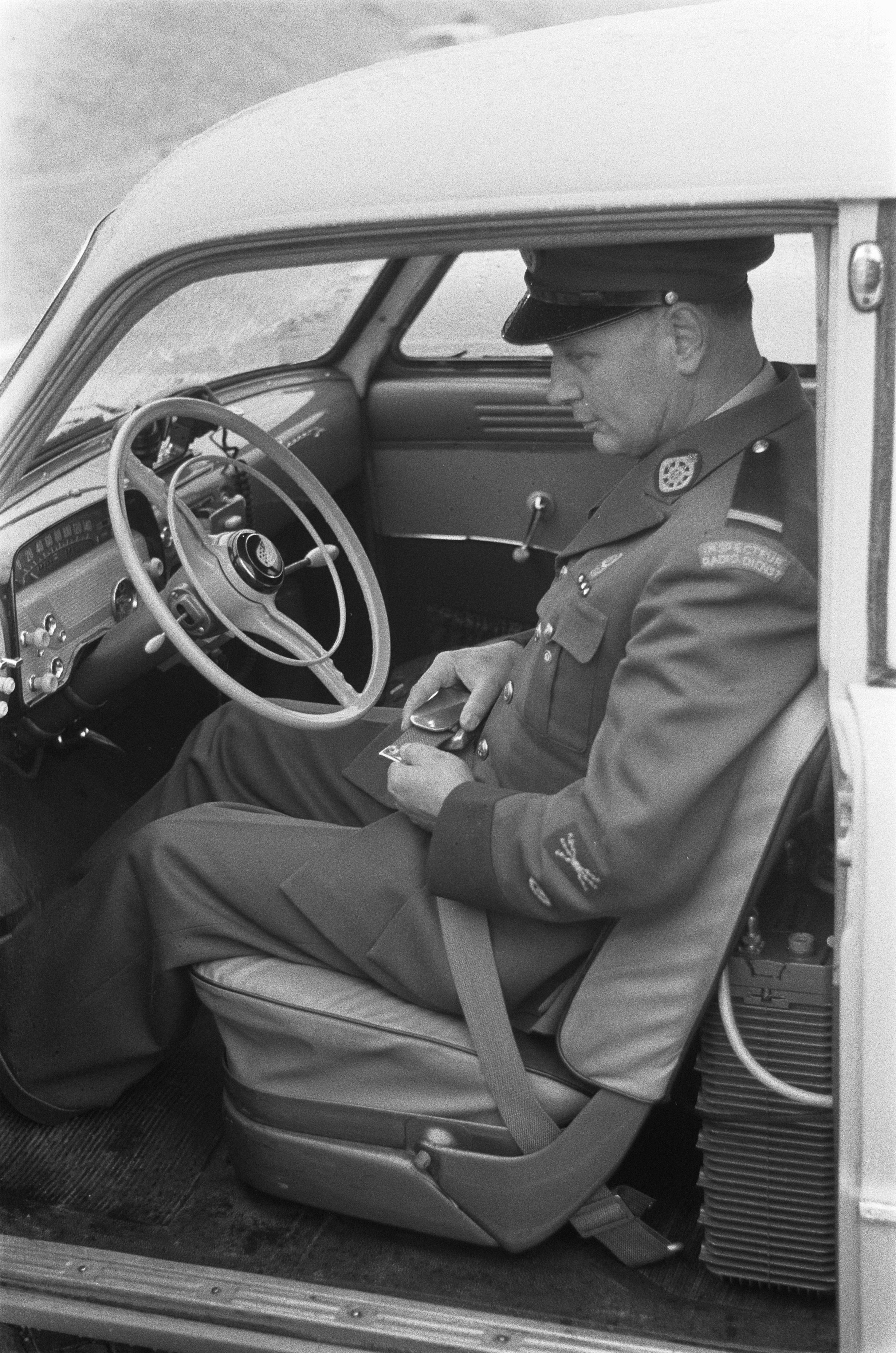 Collectie / Archief : Fotocollectie Anefo Reportage / Serie : [ onbekend ] Beschrijving : Demonstratie met veiligheidsgordels door de ANWB Datum : 10 november 1960 Trefwoorden : VEILIGHEIDSGORDELS, demonstraties Instellingsnaam : ANWB Fotograaf : Pot, Harry / Anefo Auteursrechthebbende : Nationaal Archief Materiaalsoort : Negatief (zwart/wit) Nummer archiefinventaris : bekijk toegang 2.24.01.05 Bestanddeelnummer : 911-7564